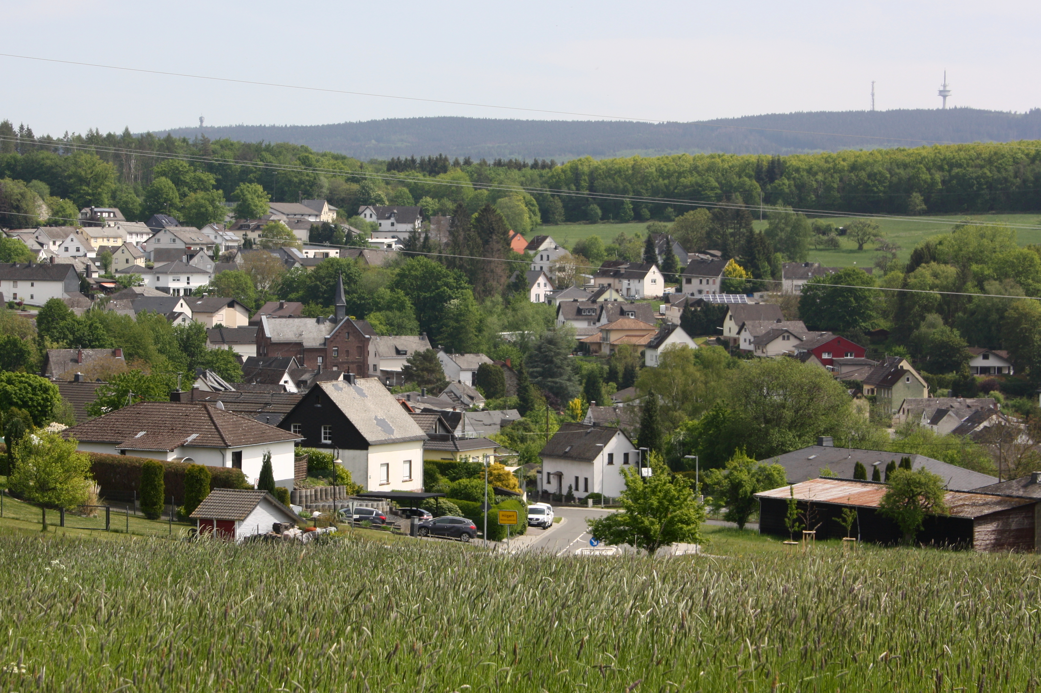 Hilgert, Westerwald, Rheinland-Pfalz, Deutschland